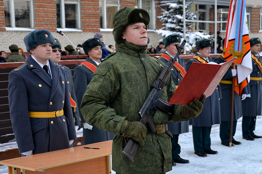 Приведение военнослужащих к воинской присяге